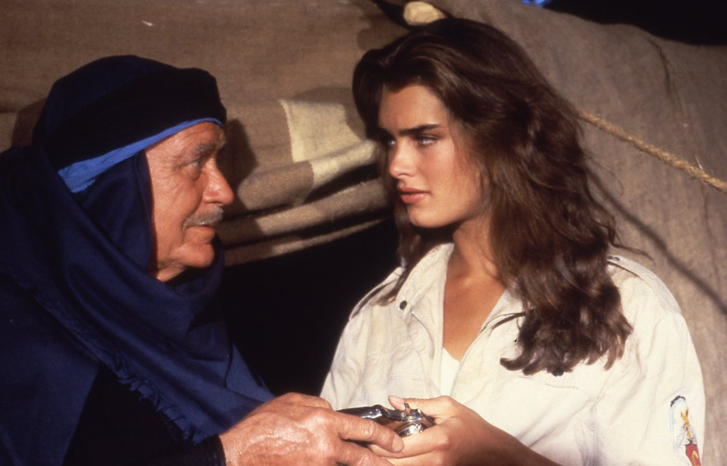 ברוק שילדס וג'ון מילס בסרט סהרה